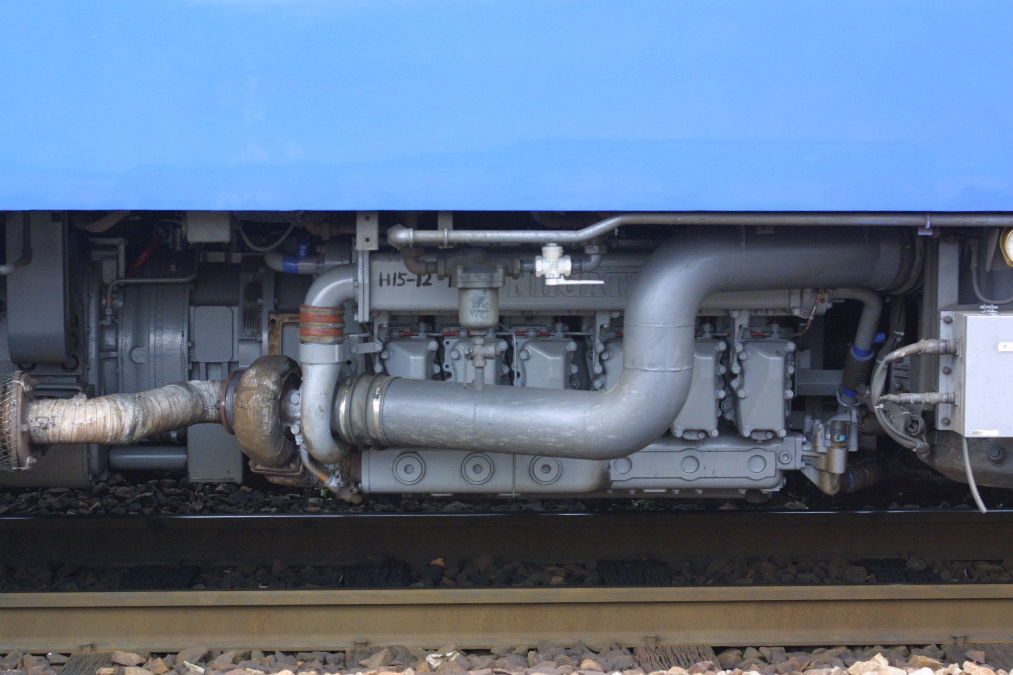 ＪＲ九州キハ６６形に搭載されている新潟原動機ＤＭＦ１３ＨＺＡエンジン